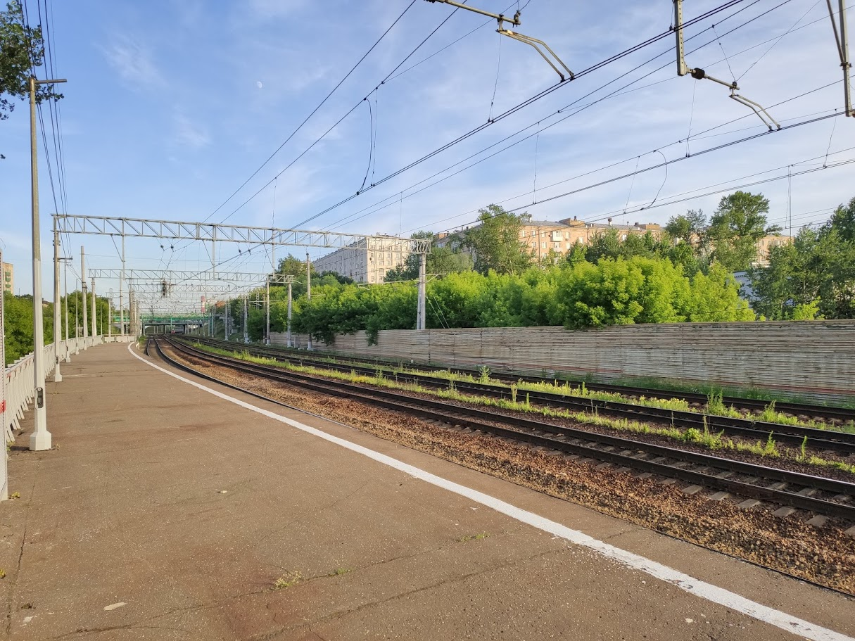 Вид с неиспользуемой платформы №1 о.п. Электрозаводская в сторону станции Перово